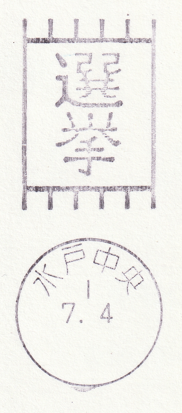 2019年、第25回参議院議員通常選挙で候補者が送った選挙用はがきの消印。日付は公示日の2019年（令和元年）7月4日付となっている。